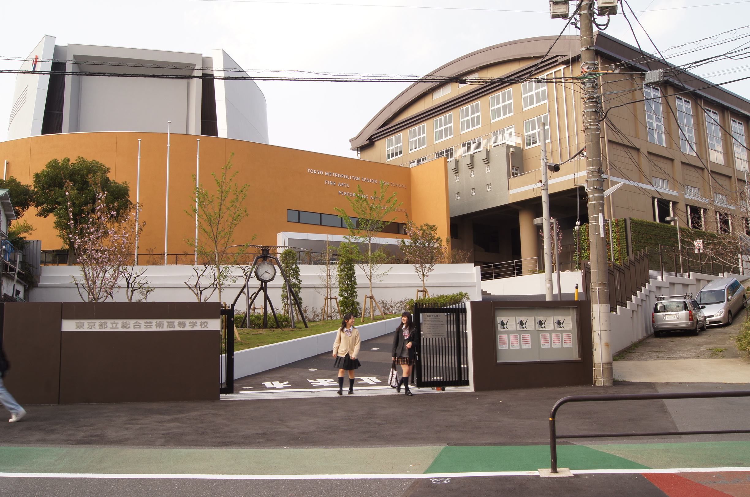 総合芸術高等学校の門を、通りの反対側から撮影。